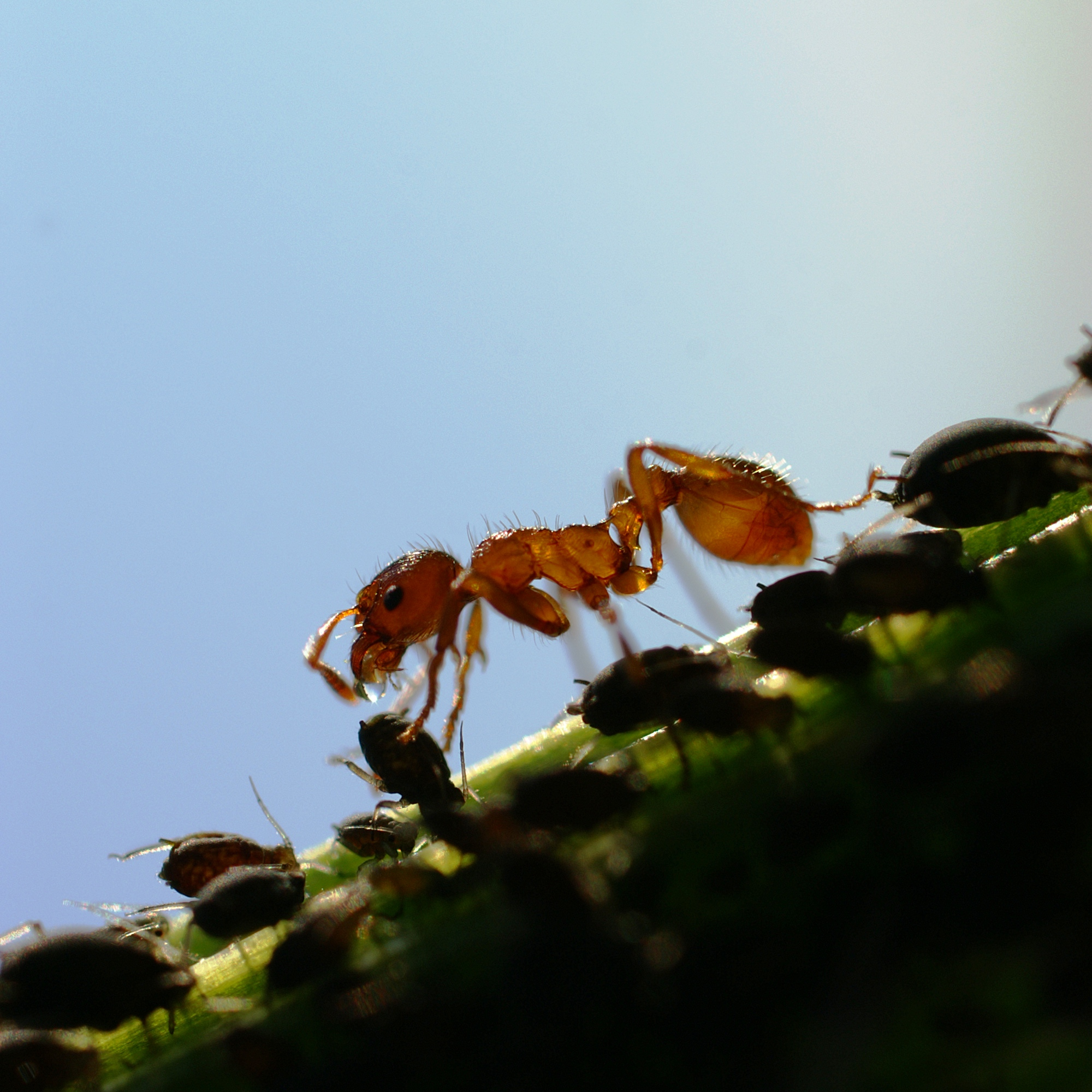 melkende Ameise Honigtau